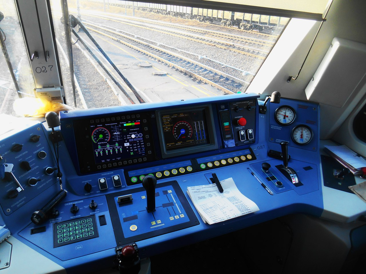 С завода поступил в депо Москва-Сортировочная-Рязанская (10.2013 г.) 03.2016 — передан в депо Ожерелье-Сортировочное 11.10.2013 — первый рейс с поездом № 19/20 Ростов-на-Дону — Москва СР Новочеркасский ЭВЗ 01.2017 г.